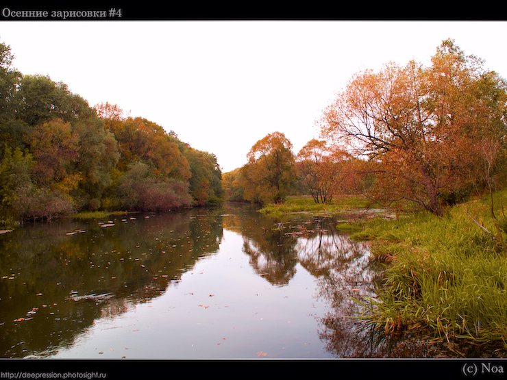 Autumn Tuskar river